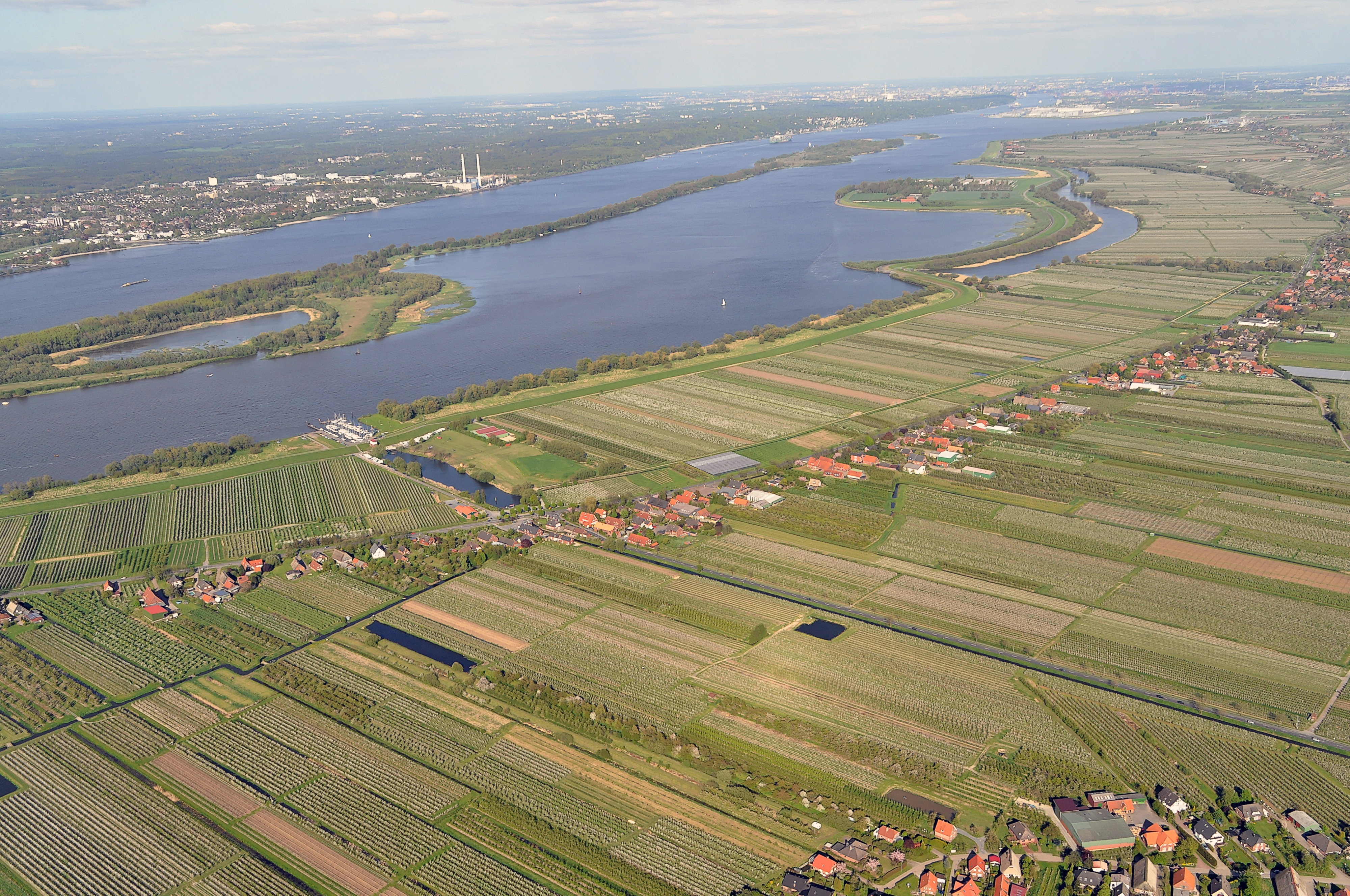 Luftbilder von der Nordseeküste 2012-05